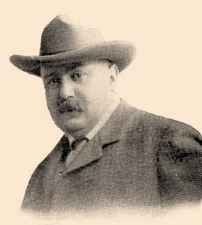 Pikler Gyula magyar jogbölcsész, egyetemi tanár, a Társadalomtudományi Társaság tagja.